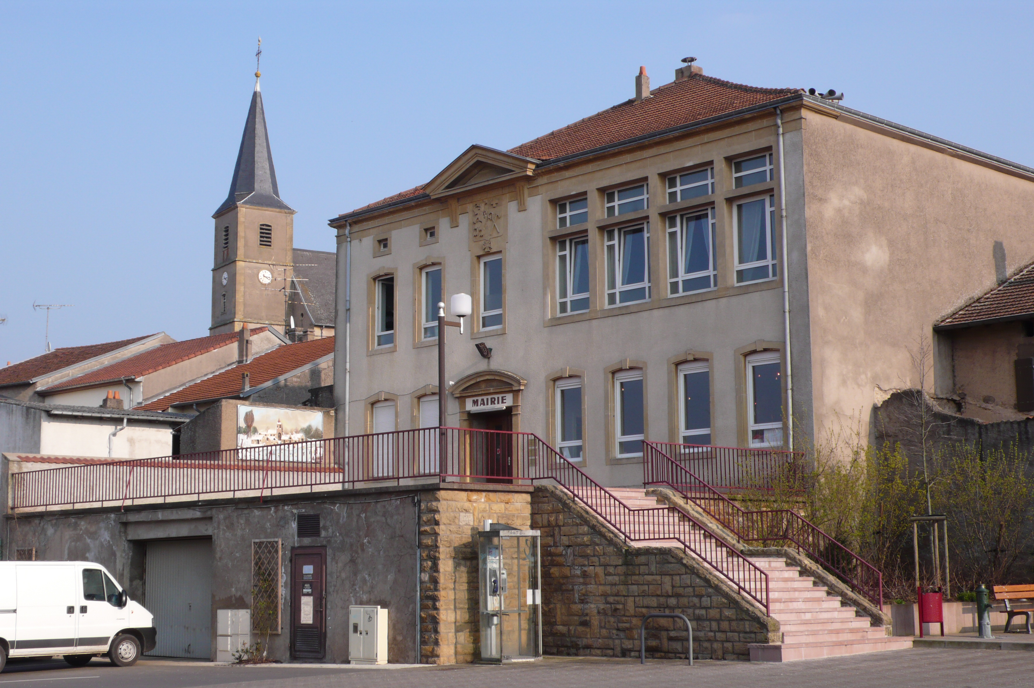 Gemeng an d'Kierch